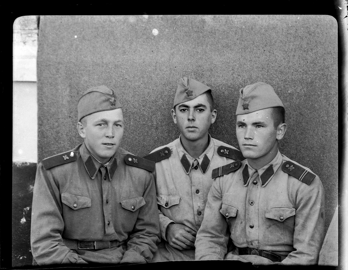 Soldaten in Gymnastjorka.